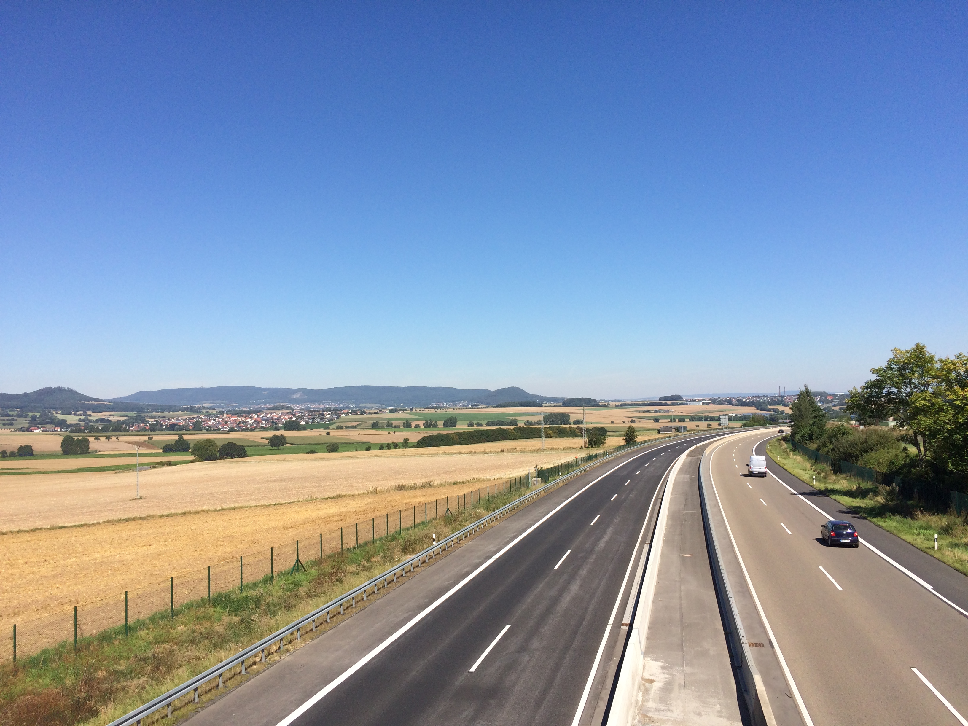 Blick von einer Brücke nahe dem Scharfenstein auf die Bundesautobahn 49. Links im Bild Besse, dahinter Großenritte und Elgershausen; rechts im Bild Hertingshausen.